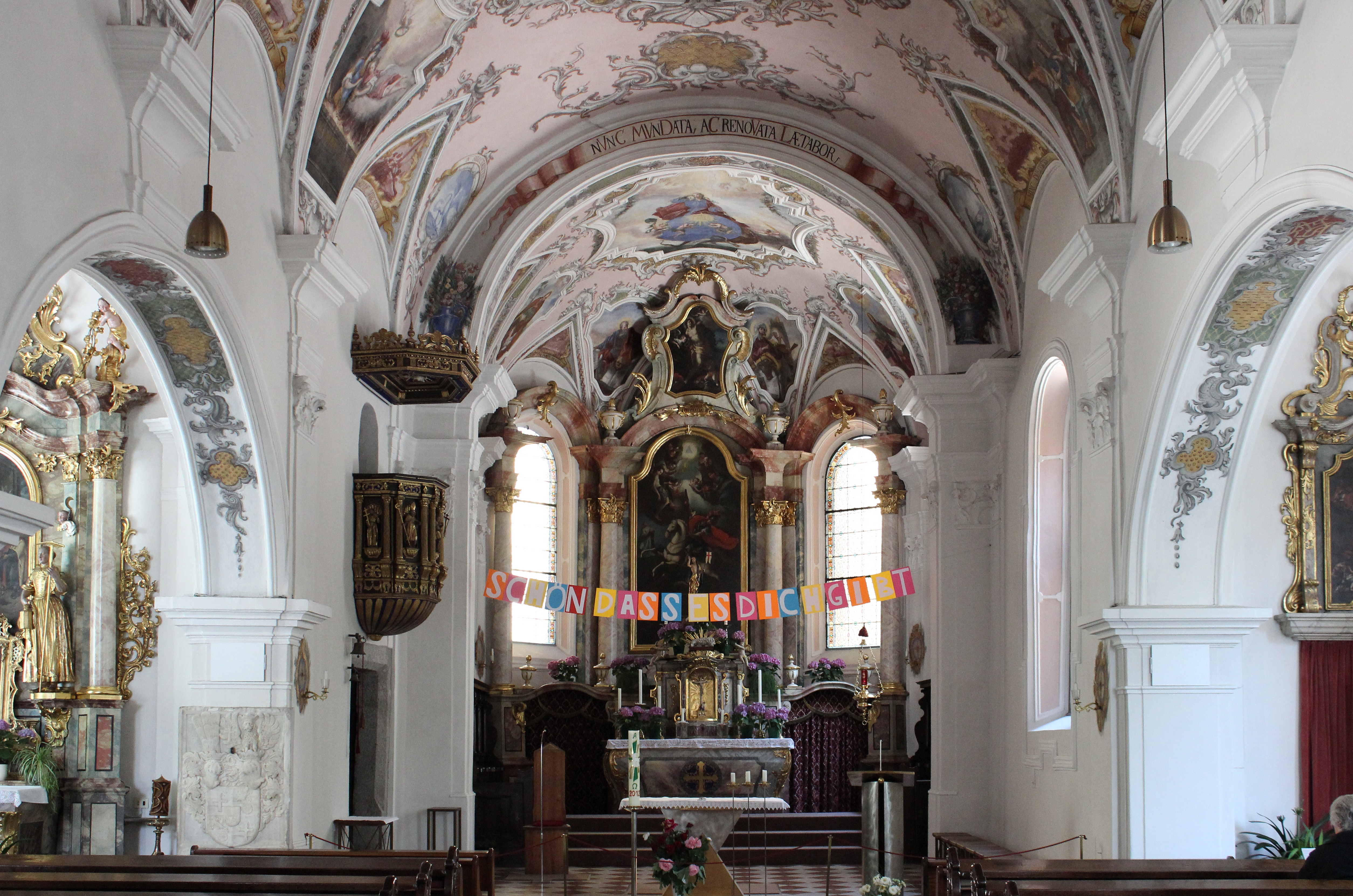 Pfarrkirche St. Georg in Obermais - Altarraum